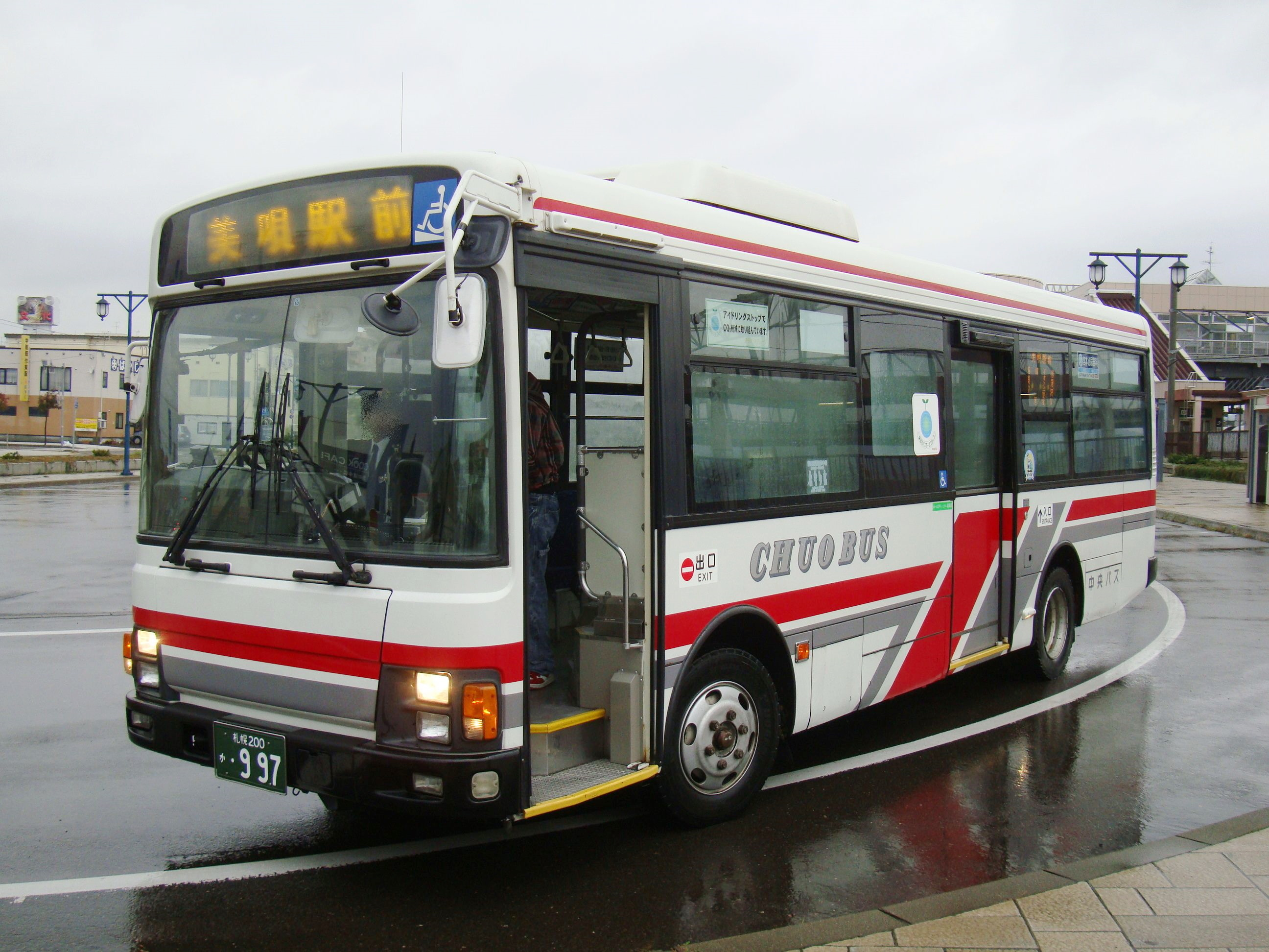 Iwamizawa to Bibai